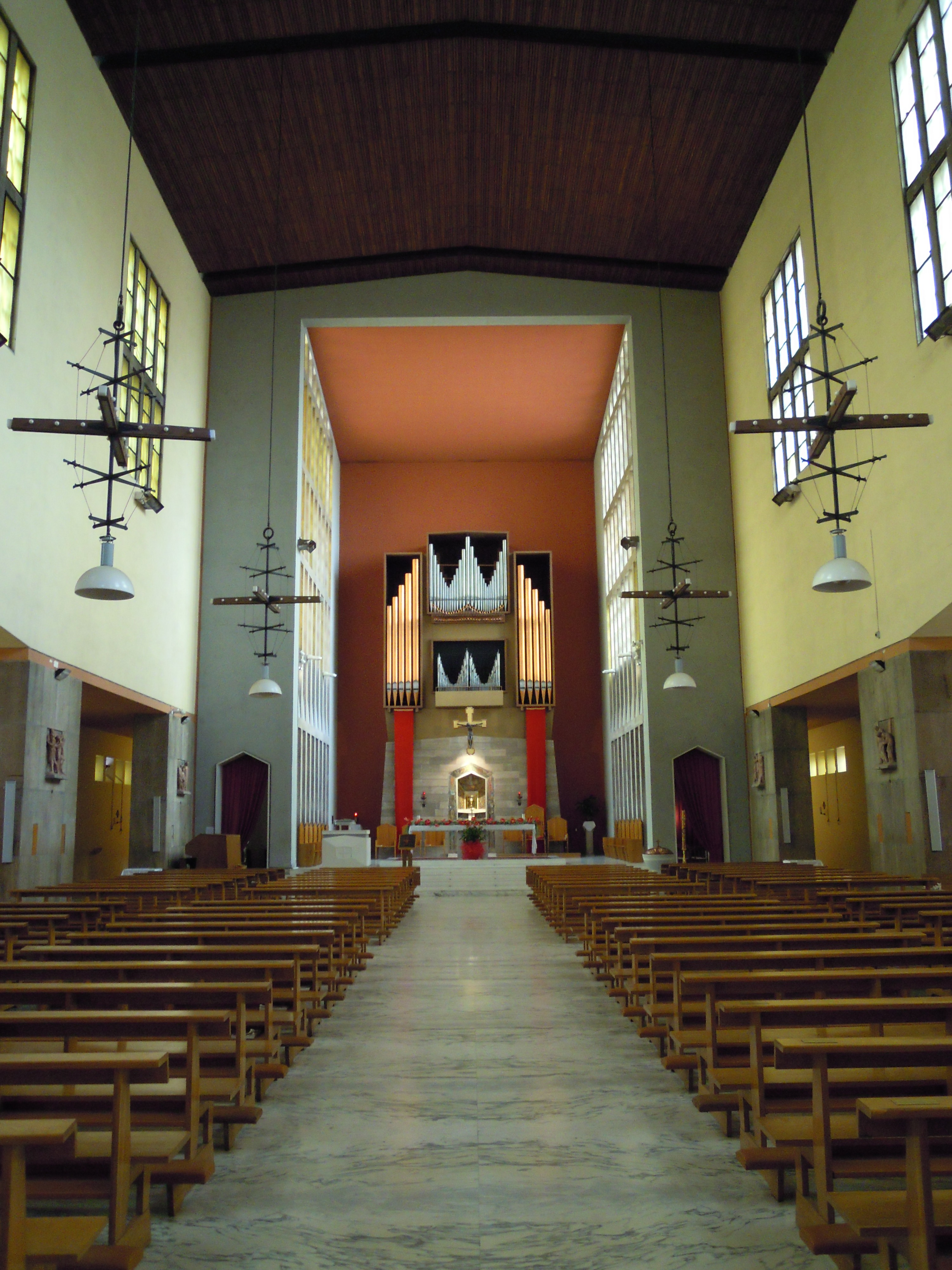 L'interno a tre navate della chiesa di San Pio X a Roma